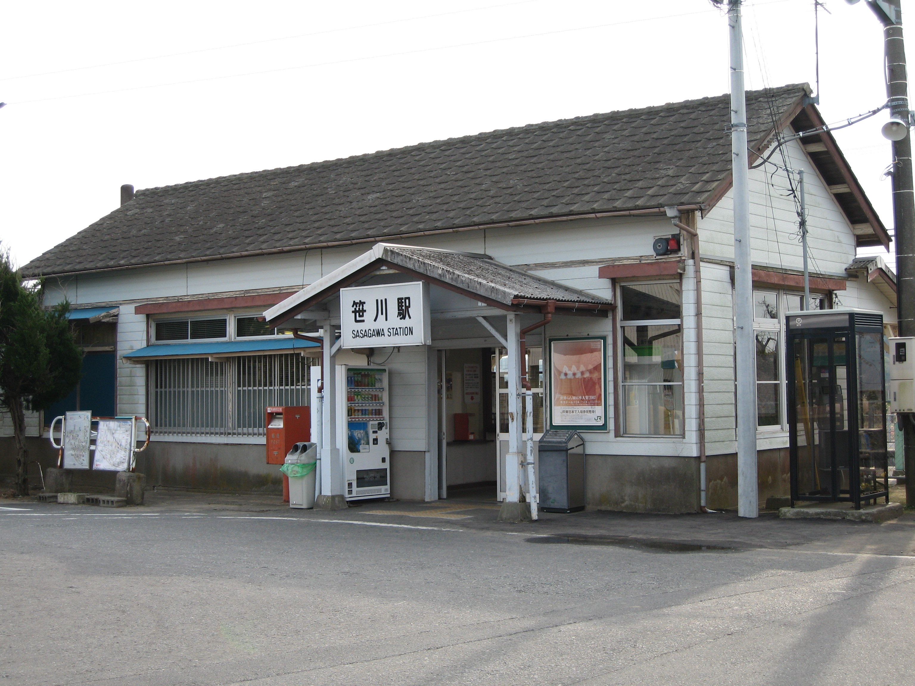 Sasagawa Station, Narita Line, Chiba, Japan, 笹川駅駅舎